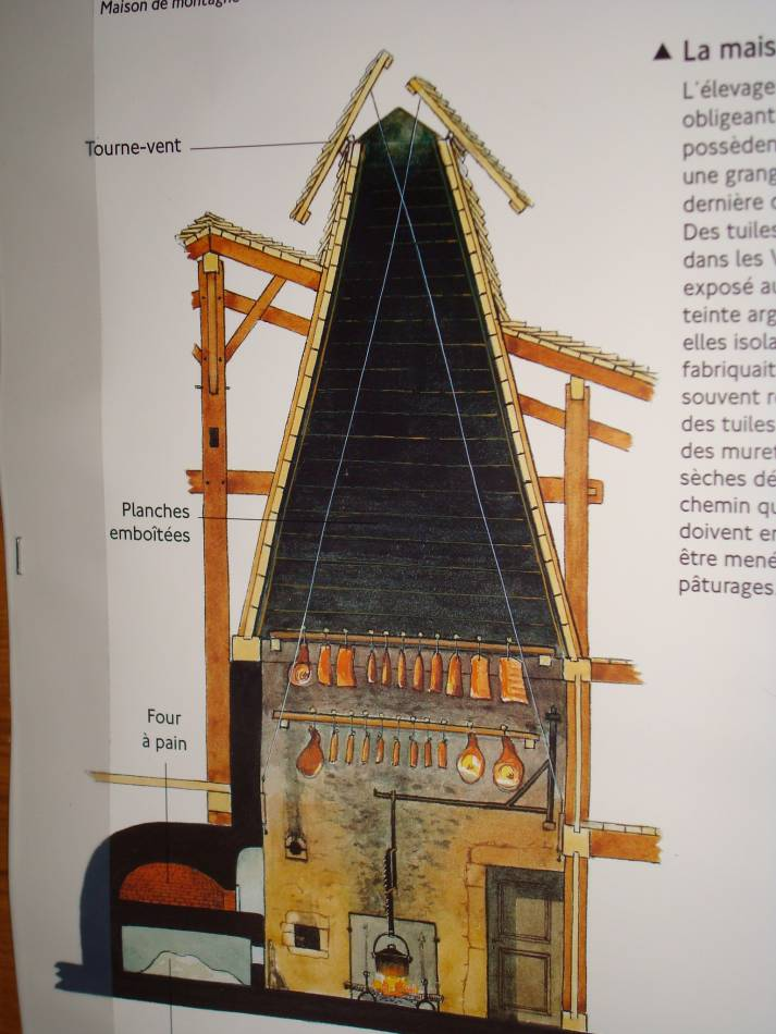 Schéma d'une cheminée appelée "Tuyé ou Tuhé" en Franche-Comté.